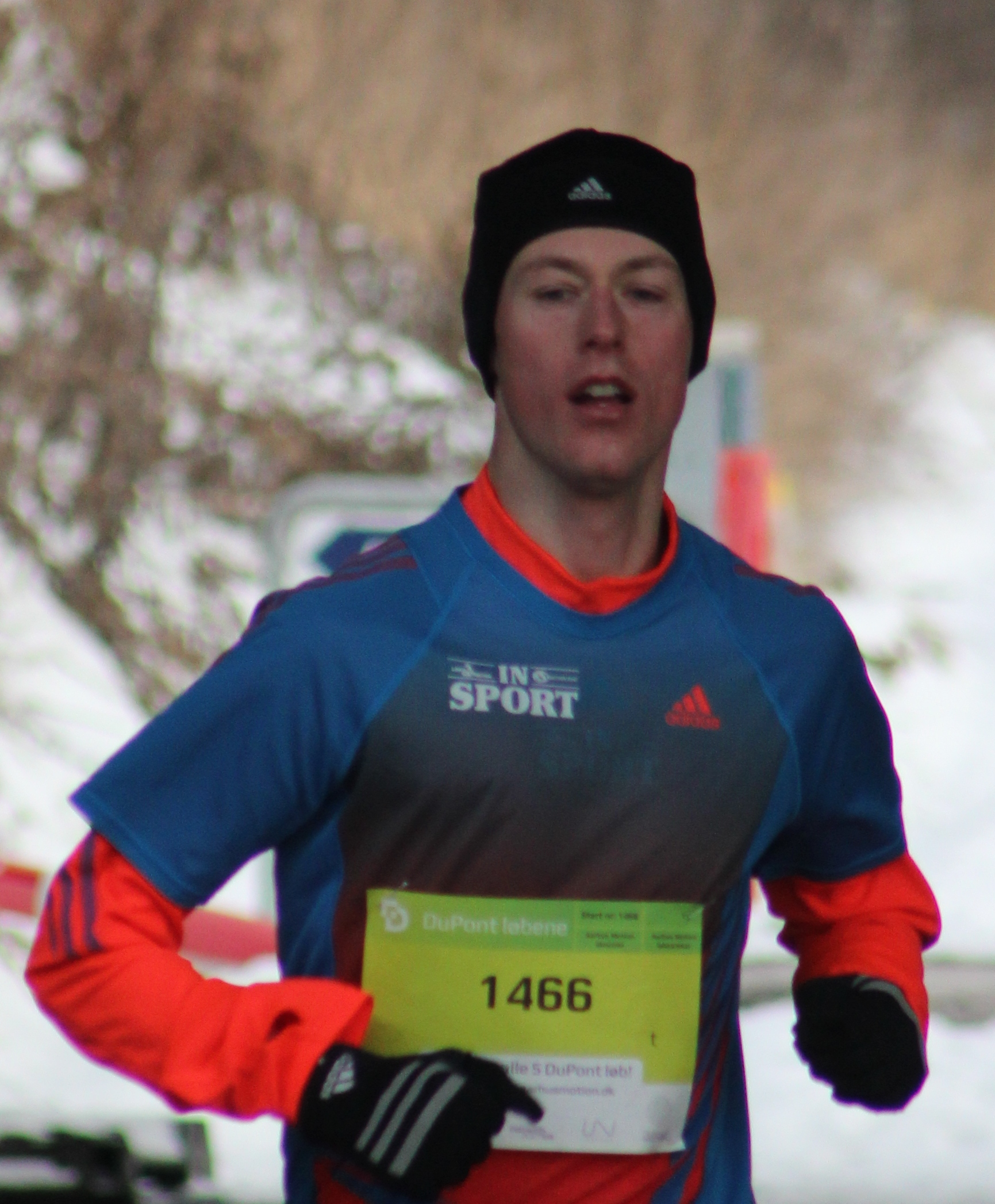 Ulrik Heitmann er dansk atletikløber